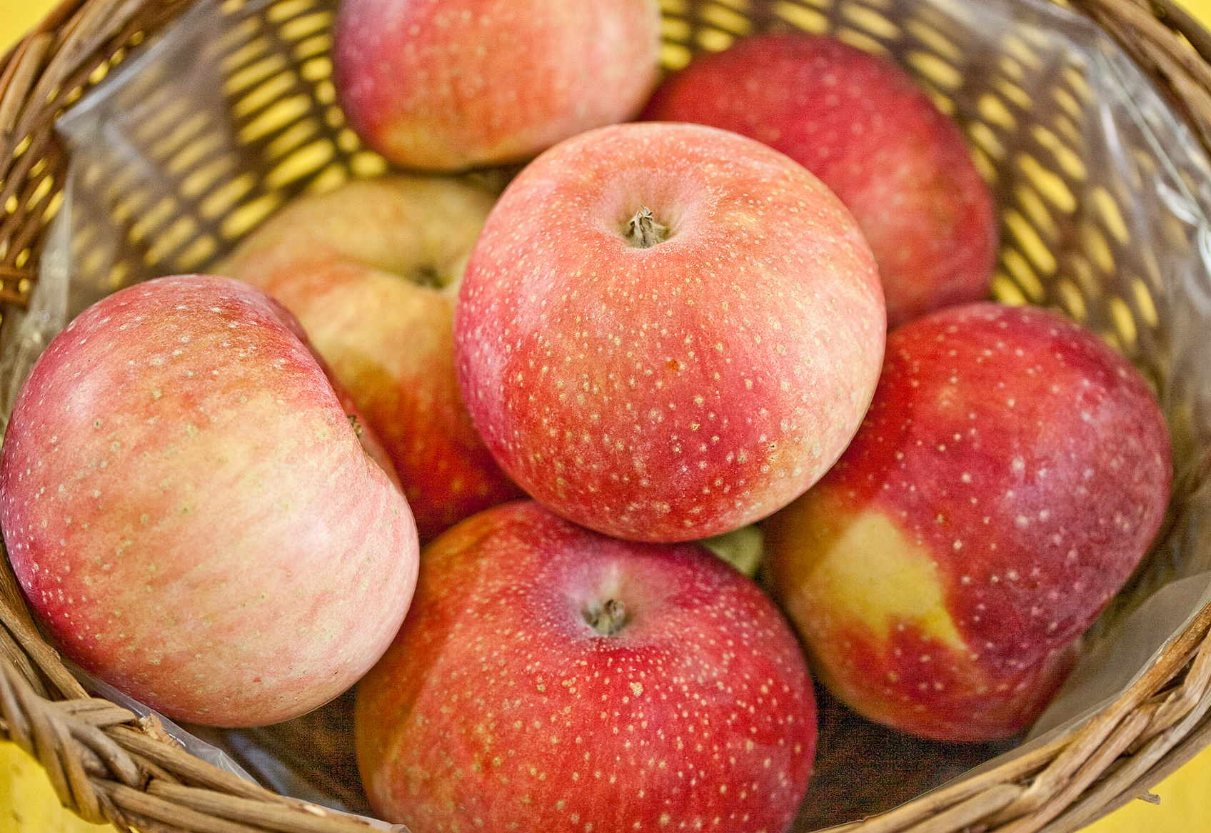 Der Lobo ist eine Apfelsorte